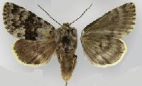 Lasionycta caesia male